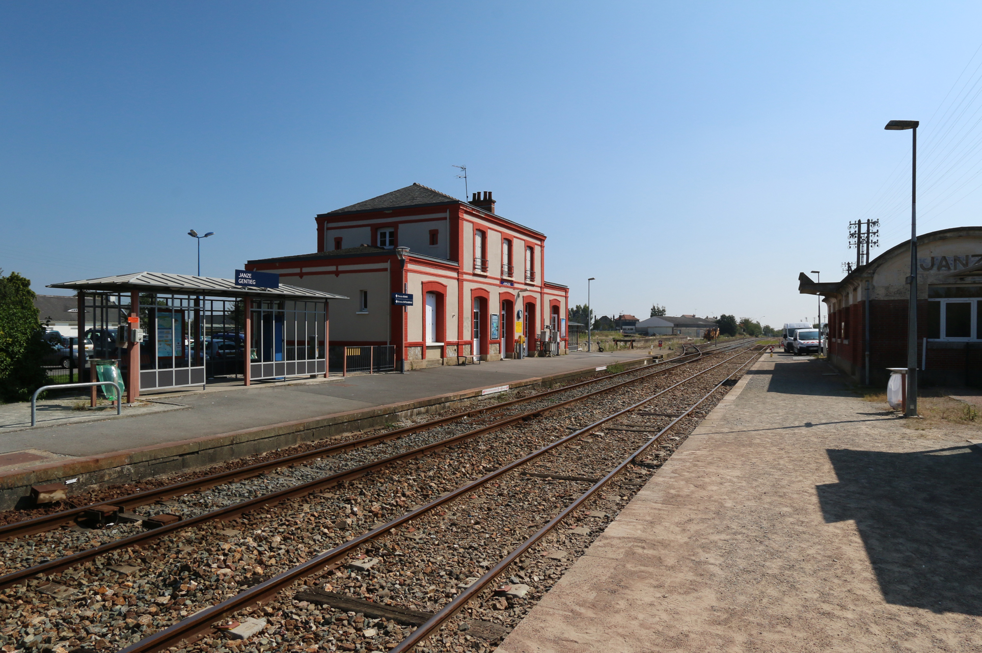 La gare de Janzé